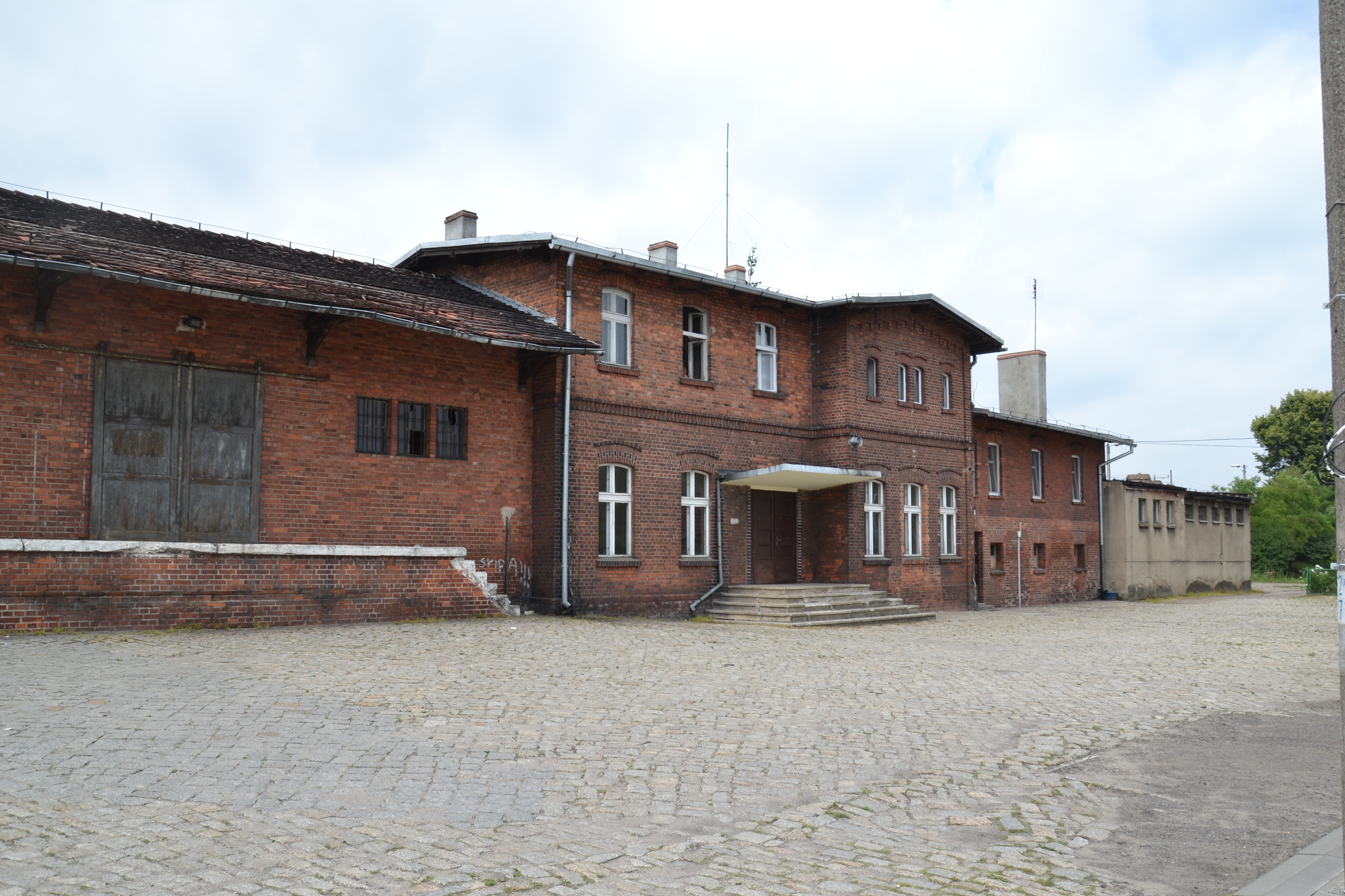 Widok dworca w Orzechowie od strony miasta